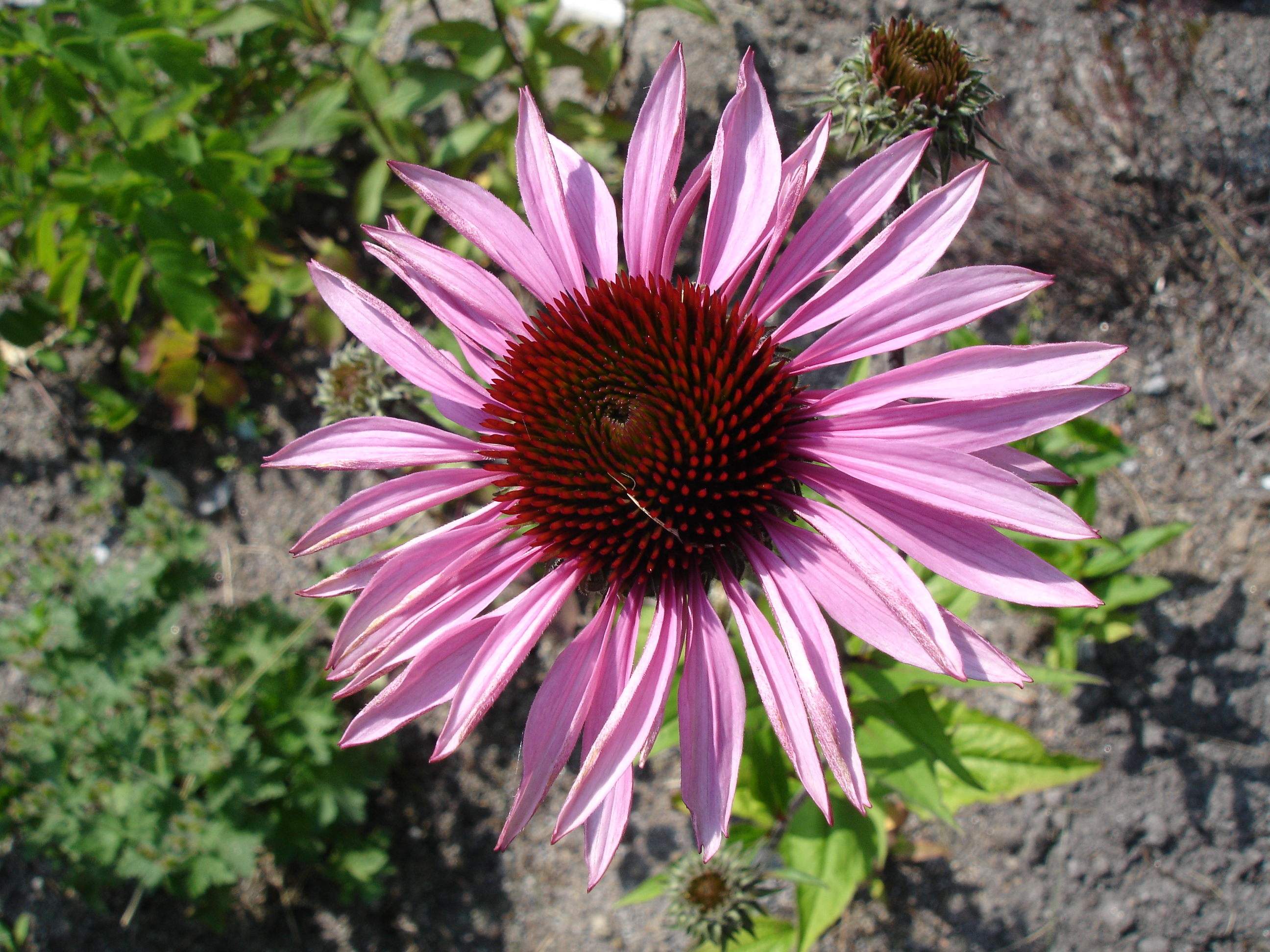 Echinacea purpurea 'Merlot'